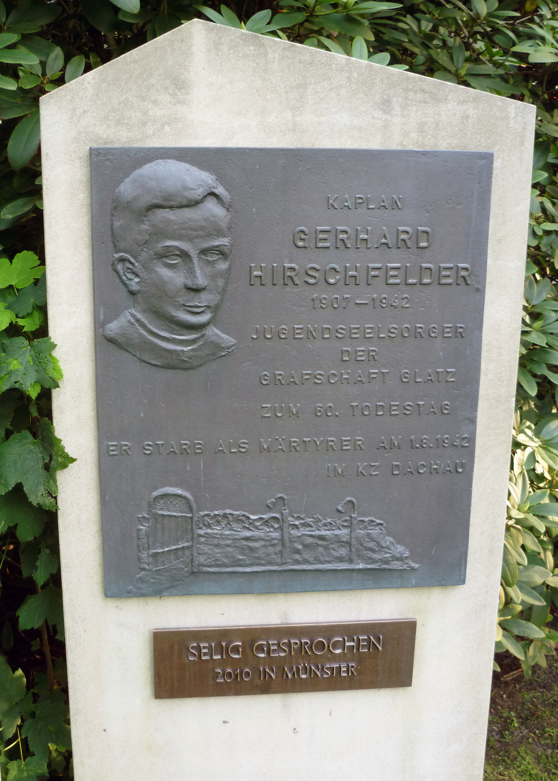 Gedenktafel für den Geistlichen Gerhard Hirschfeld in Telgte